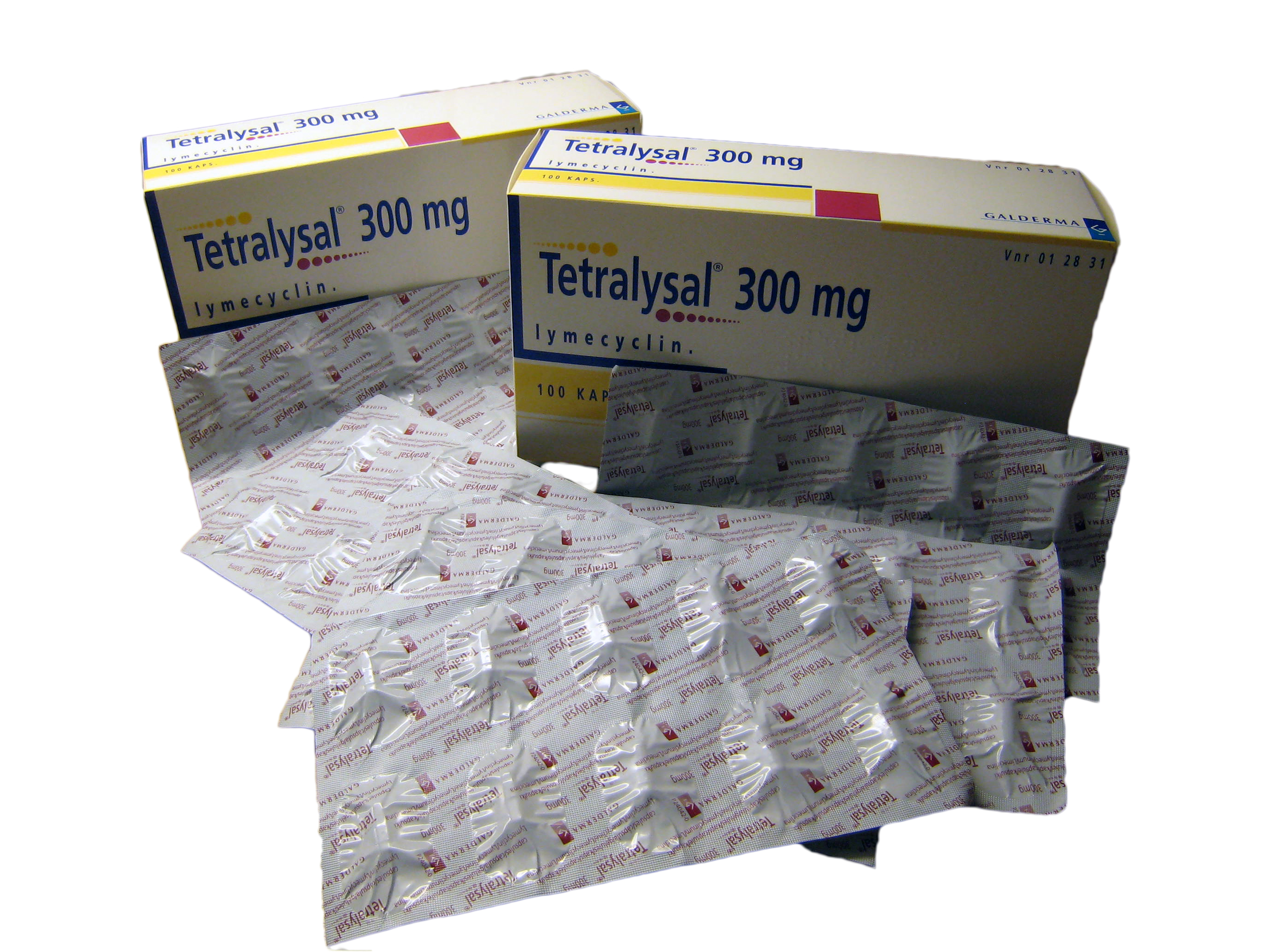 Tetrasykliiniin perustuva antibioottivalmiste